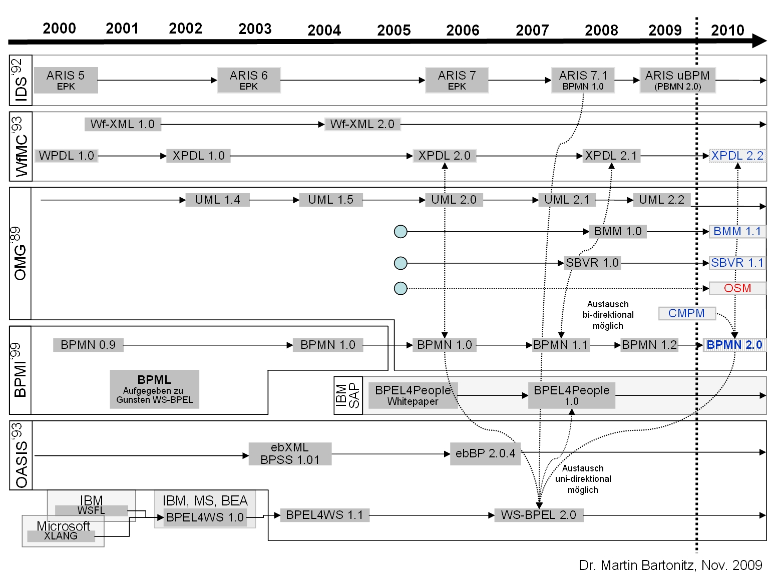 Historische Entwicklung wichtiger Standards im Business Process Management